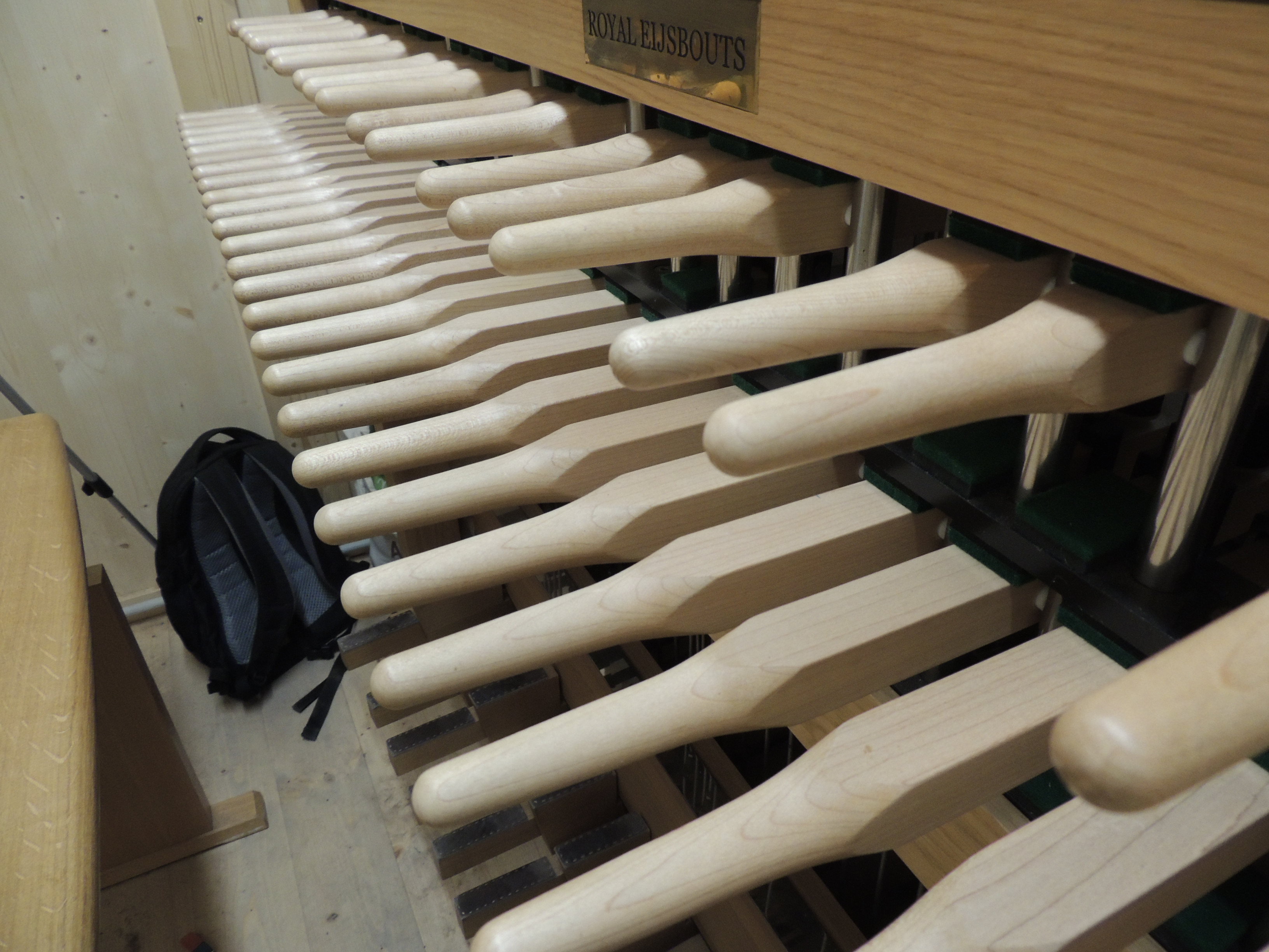 Manualtasten des Carillons in München / Mariahilf